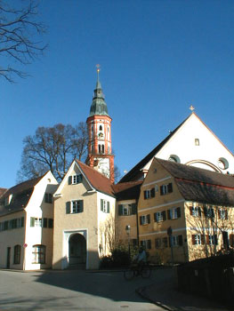 Description: Wehranlage St. Michael mit Kirchbogen